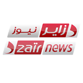 دزاير نيوز